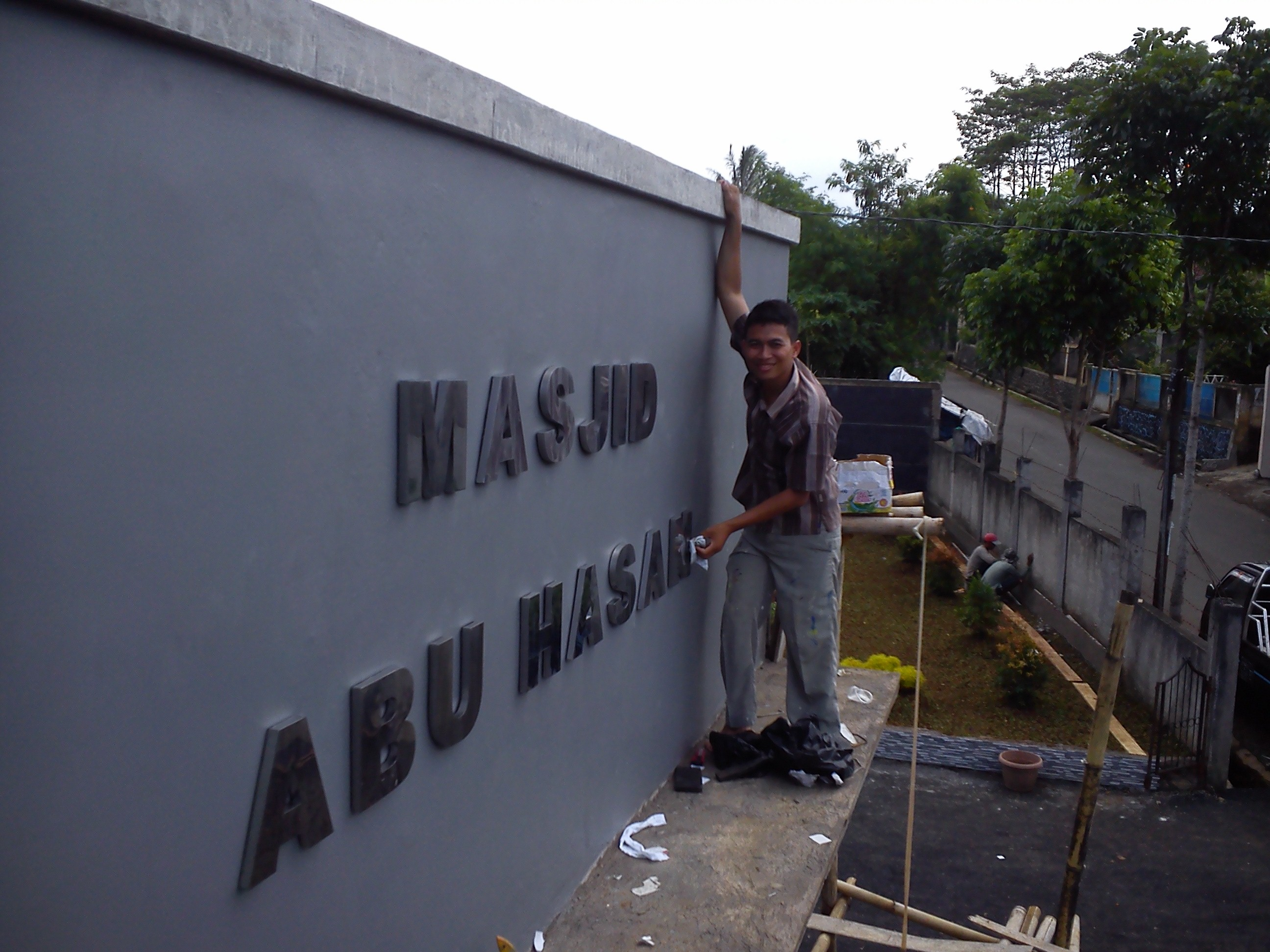 kaligrafi stainlestel